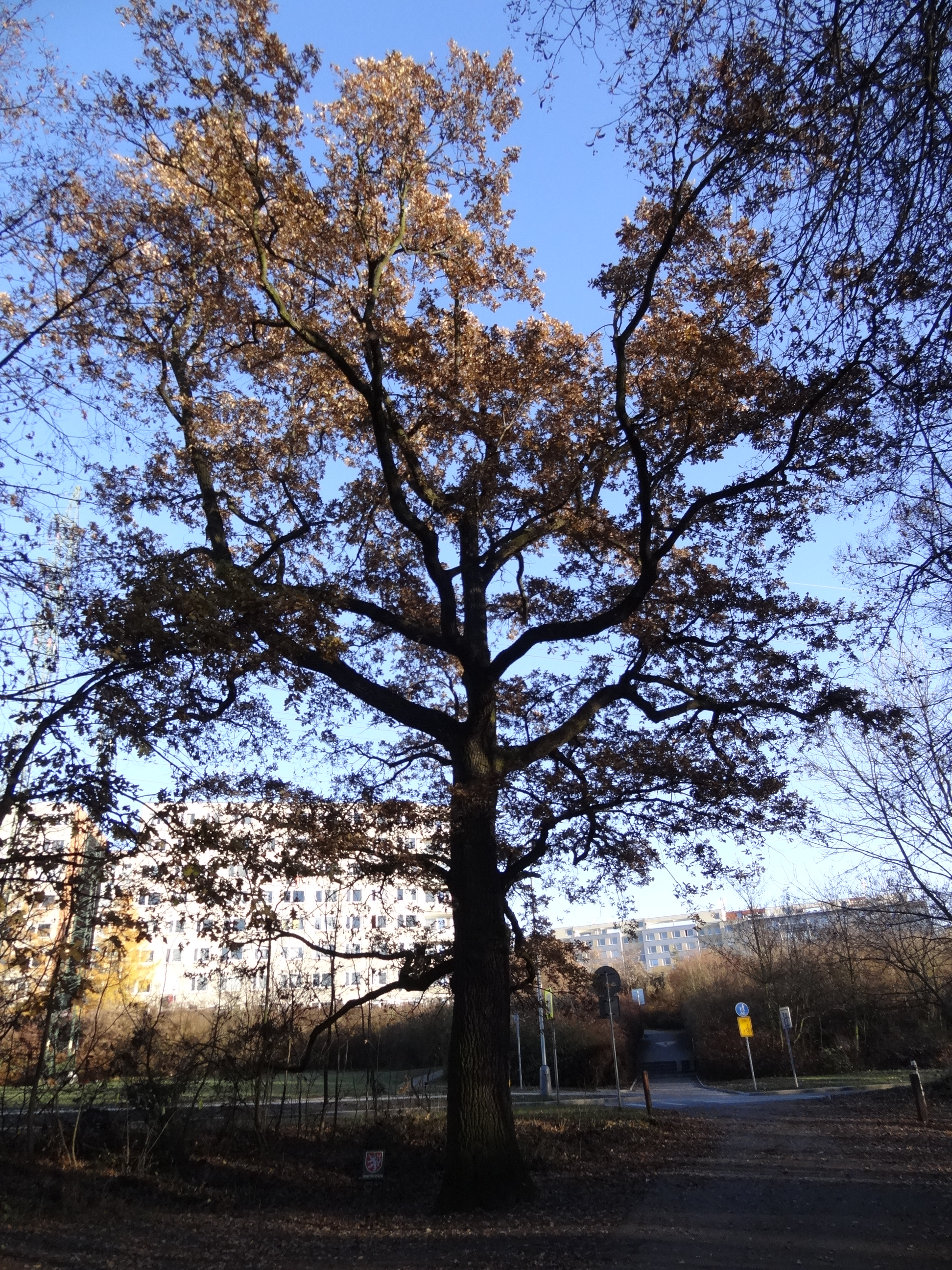 Praha - památné duby na východním okraji Kunratického lesa - strom 1